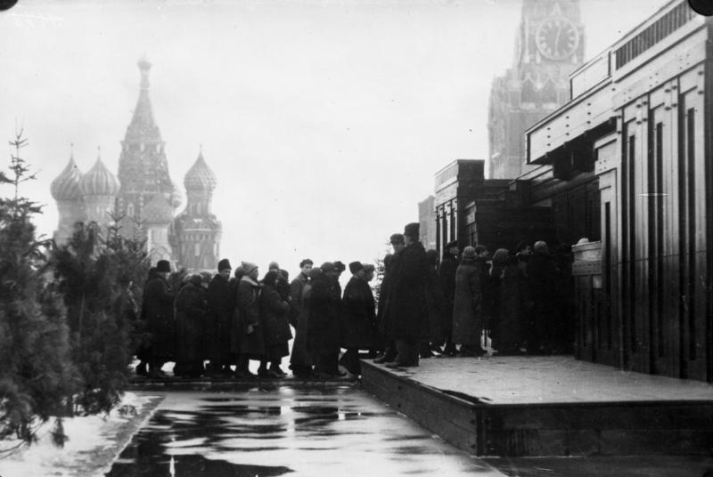 Der tägliche Andrang zu dem Grabe Lenins, welcher Tag und Nacht geöffnet ist und von allen Schichten der Bevölkerung besucht wird.